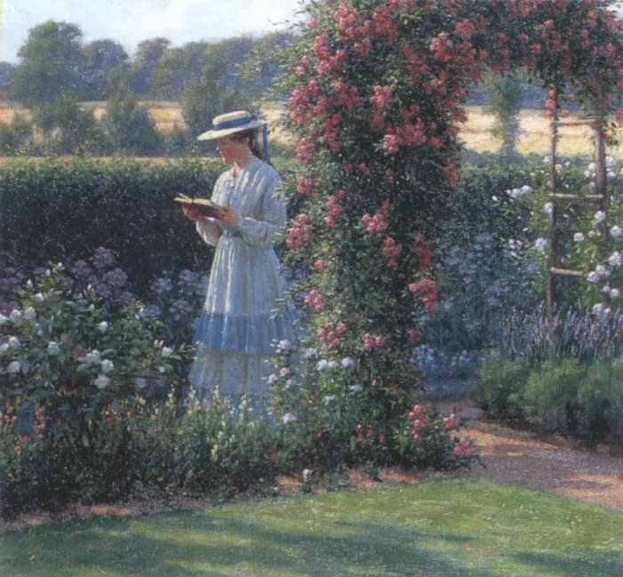 Sweet solitude